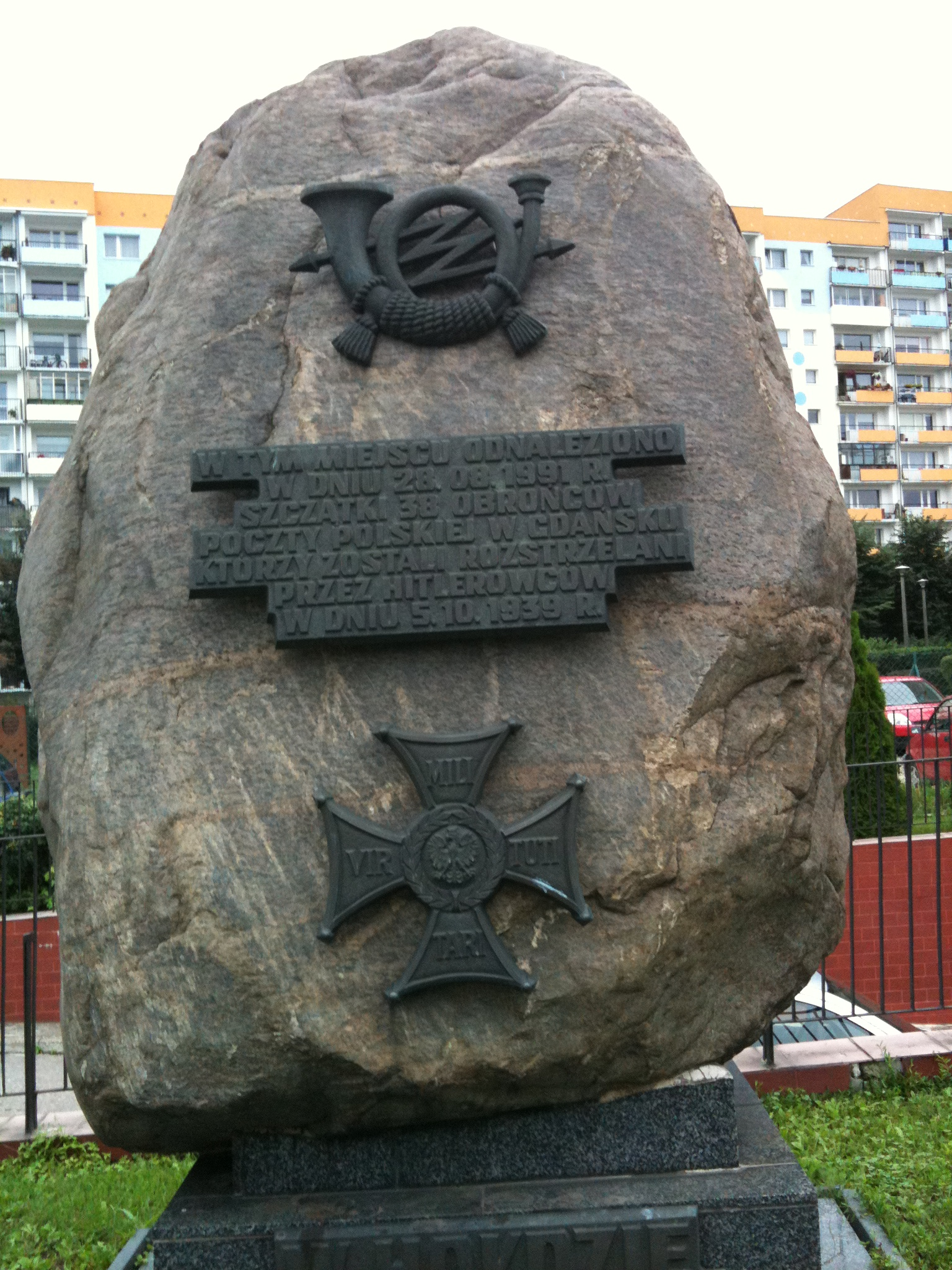 Gdańsk Zaspa - kamień pamiątkowy w miejscu rozstrzelania obrońców Poczty Polskiej w Gdańsku (Niemcy dokonali tej zbrodni najprawdopodobniej 5 października 1939). Pomnik "W Hołdzie Bohaterom".